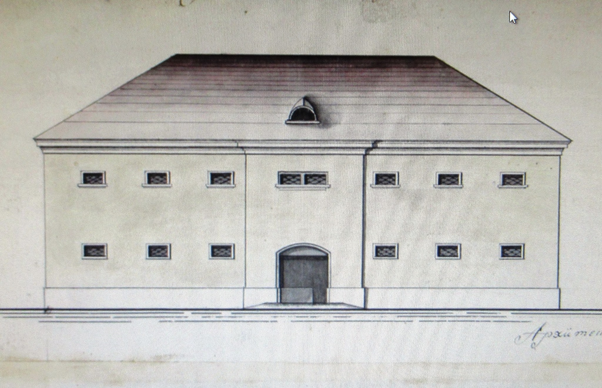 Беларуская (тарашкевіца): Праект правіянцкіх магазынаў, рэалізаваны ў Рагачове (Rahačoŭ) і Новай Беліцы (Novaja Bielica)